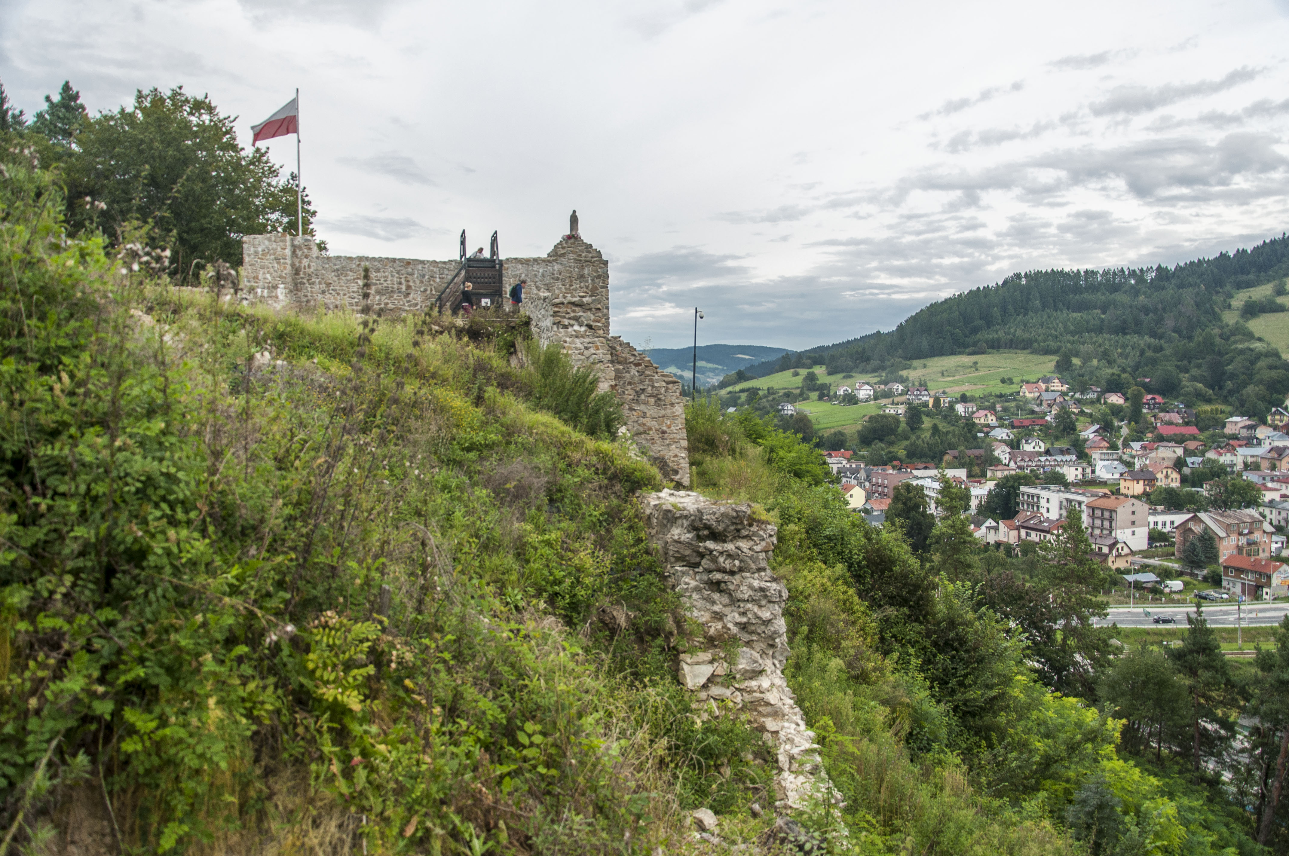 Muszyna, ruiny zamku, XIV, XVI